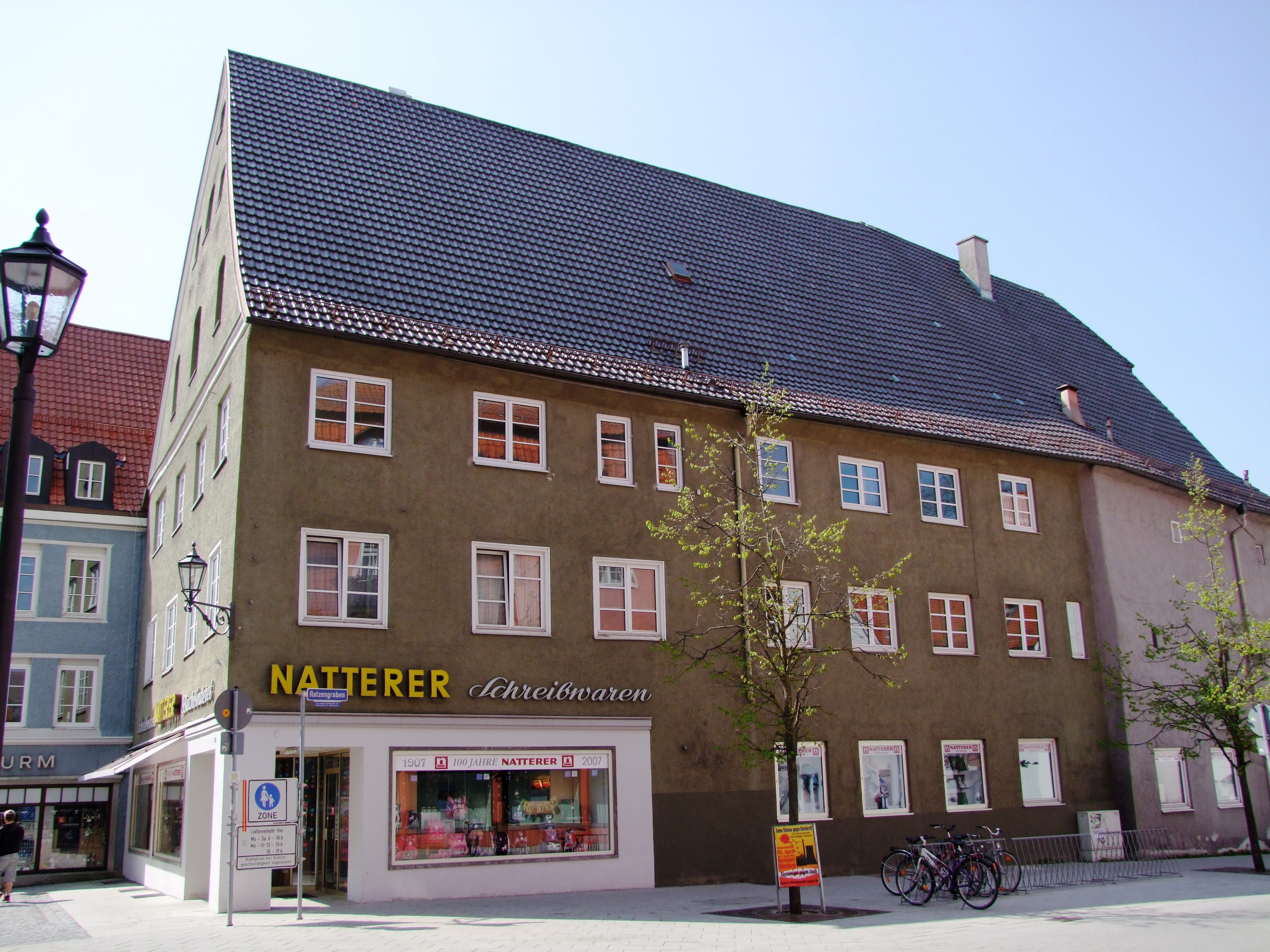 Hausfassade in der Kalchstraße im oberschwäbischen Memmingen